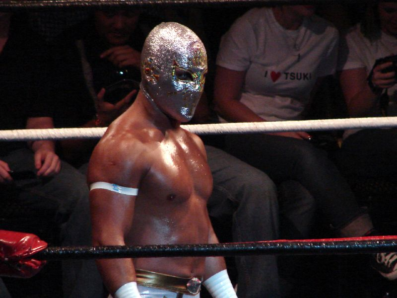 Lucha Va Voom 6-20-06